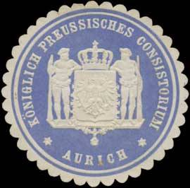 Sealing stamp Title: Königlich Preussisches Consistorium Aurich Description: blau, weiß, geprägt Place: Aurich size: 4 cm